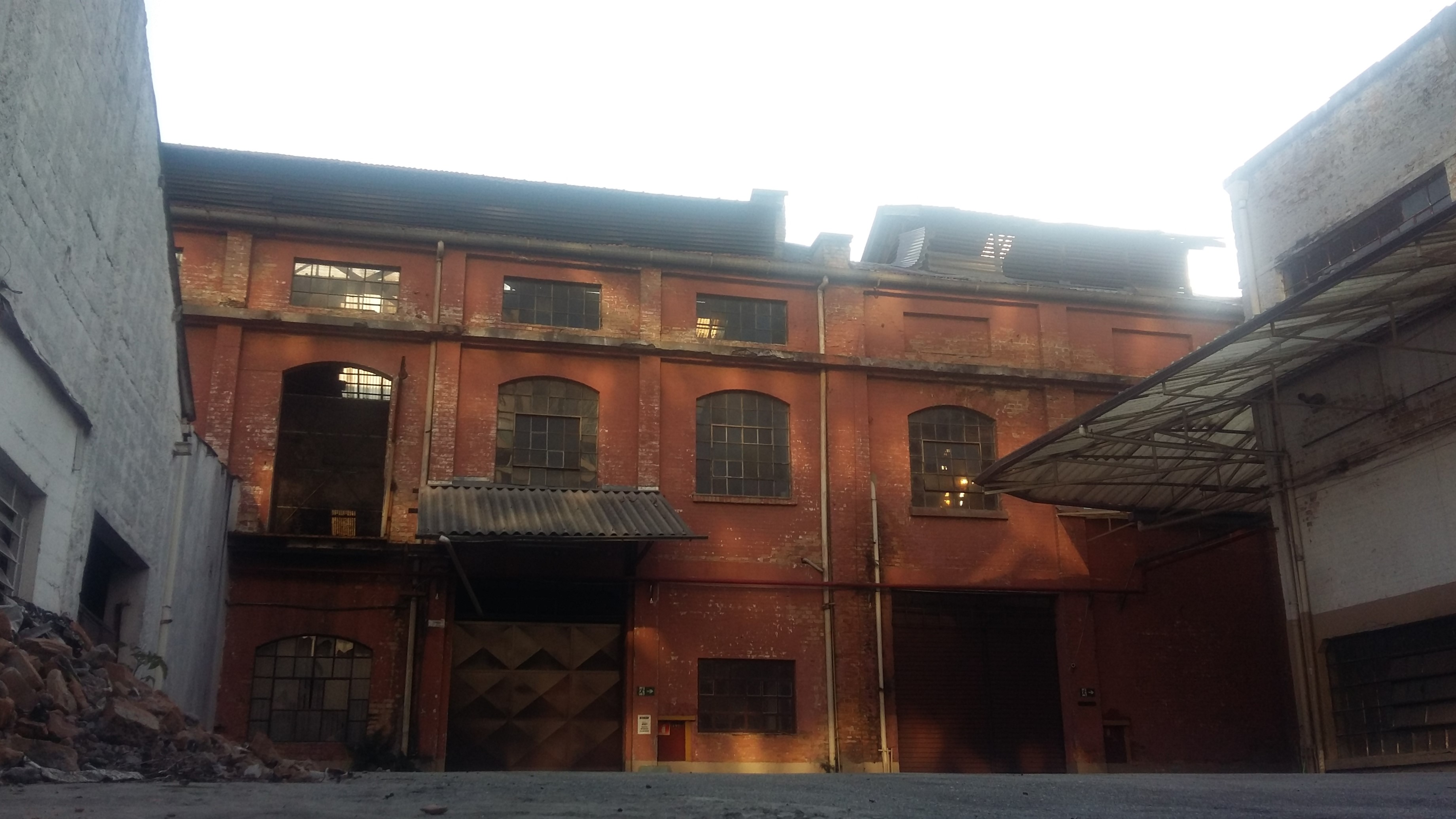 Entrada interna de um dos armazéns da Antiga São Paulo Railway, na Mooca em São Paulo - SP